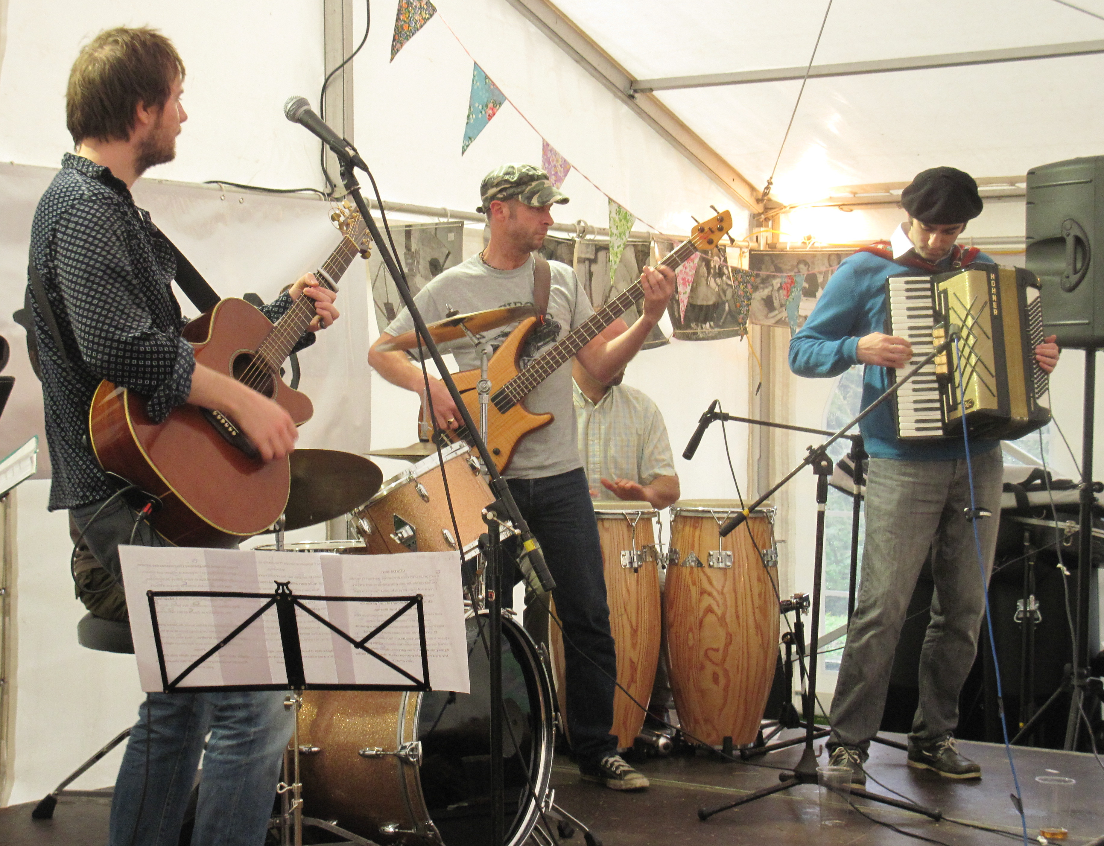 Nrf: Badlabecques, Faîs'sie d'Cidre, Octobre 2012, Jèrri